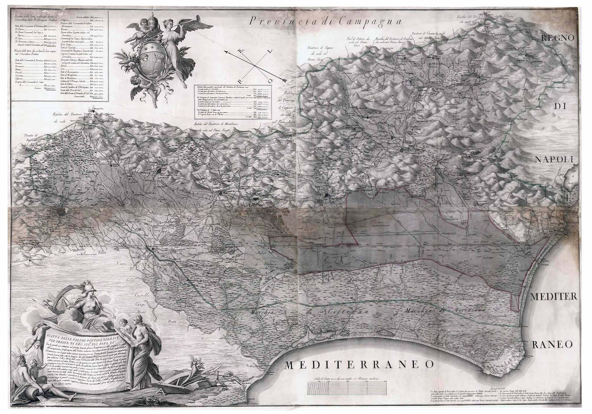 Map of Papal State Campagna province with Pontine Marshes (XVIII century); Pianta delle Paludi pontine formata per ordine di N.ro Sig.re Pio Papa VI (XVIII secolo)